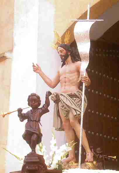 Jesús Resucitado, Herrera. Imagen de Francisco Buiza, realizada en 1973